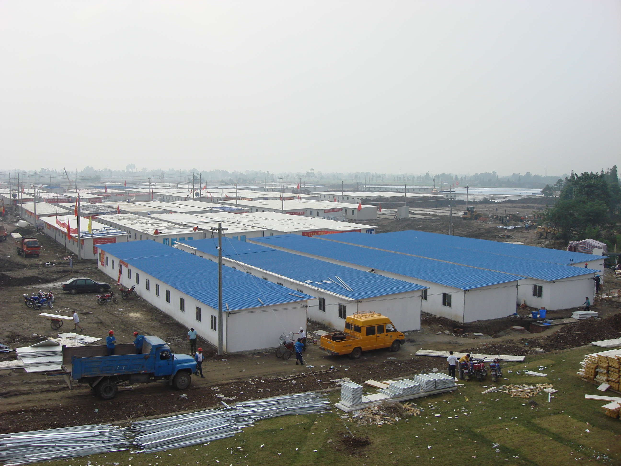 景观大道板房区